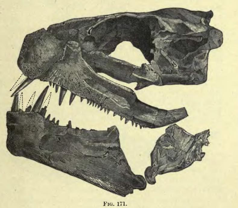 shull of Xiphactinus, Череп ксифактина ("портеуса")